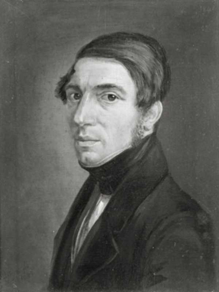 Zelfportret van Petrus Josephus Lutgers (1808-1874)